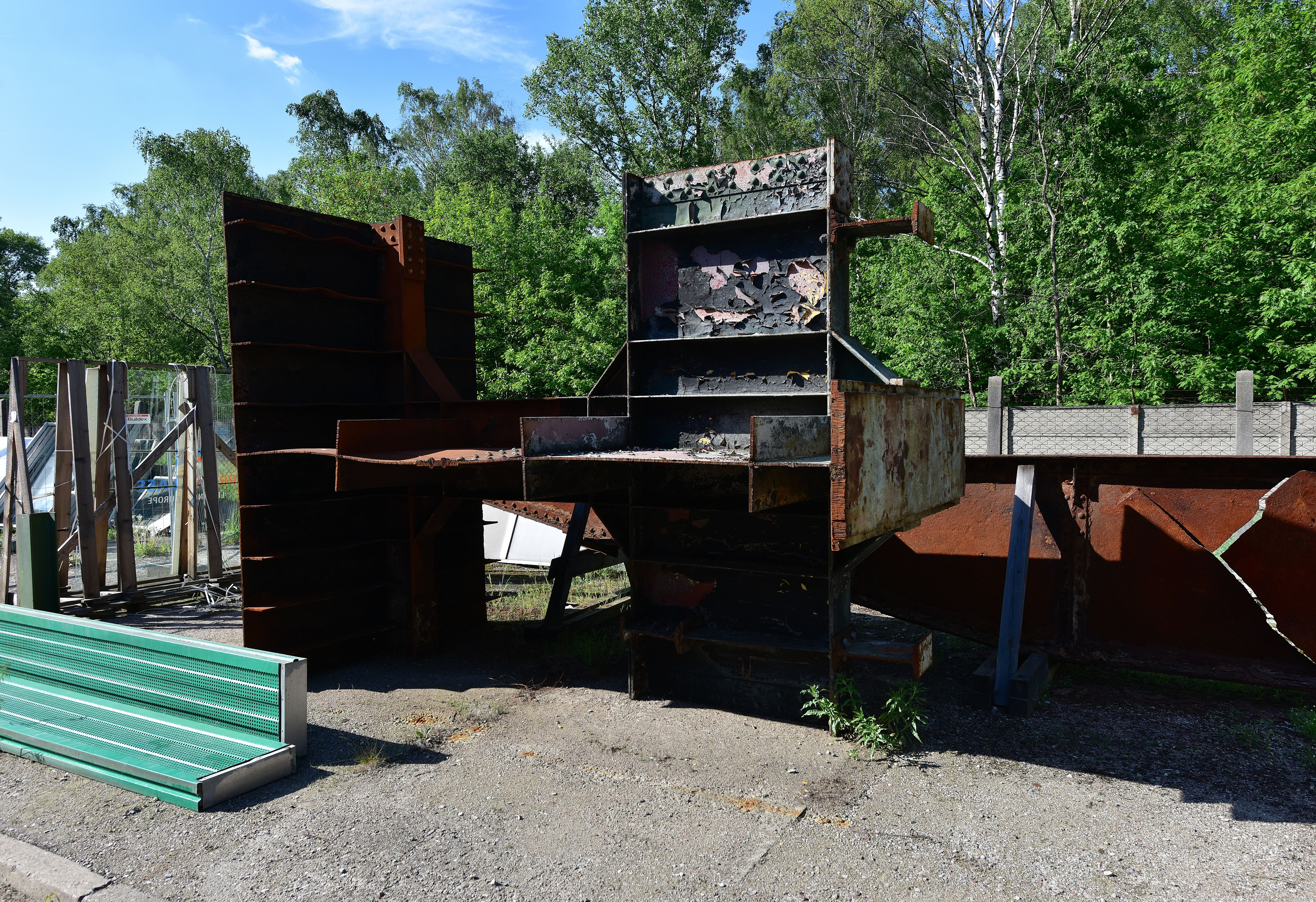 Fragment spalonego mostu Łazienkowskiego na terenie Instytutu Badawczego Dróg i Mostów przy ul. Instytutowej 1 w Warszawie